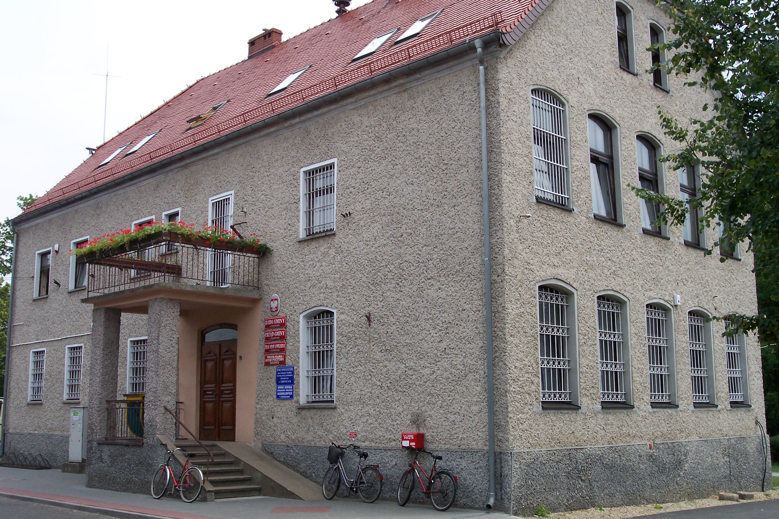 Gebäude der Gemeindeverwaltung in Zębowice